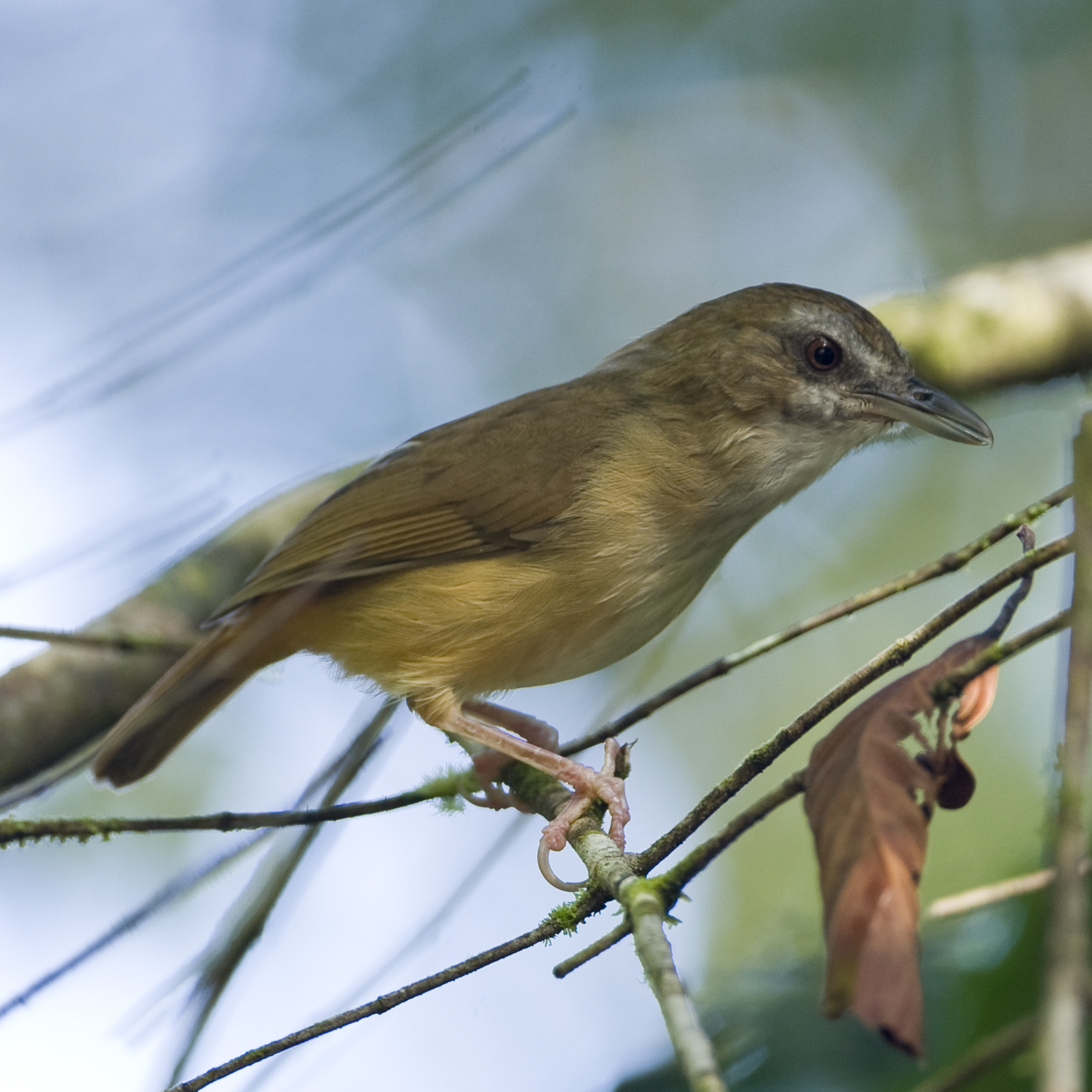 Sri Phang Nga National Park, Thailand.